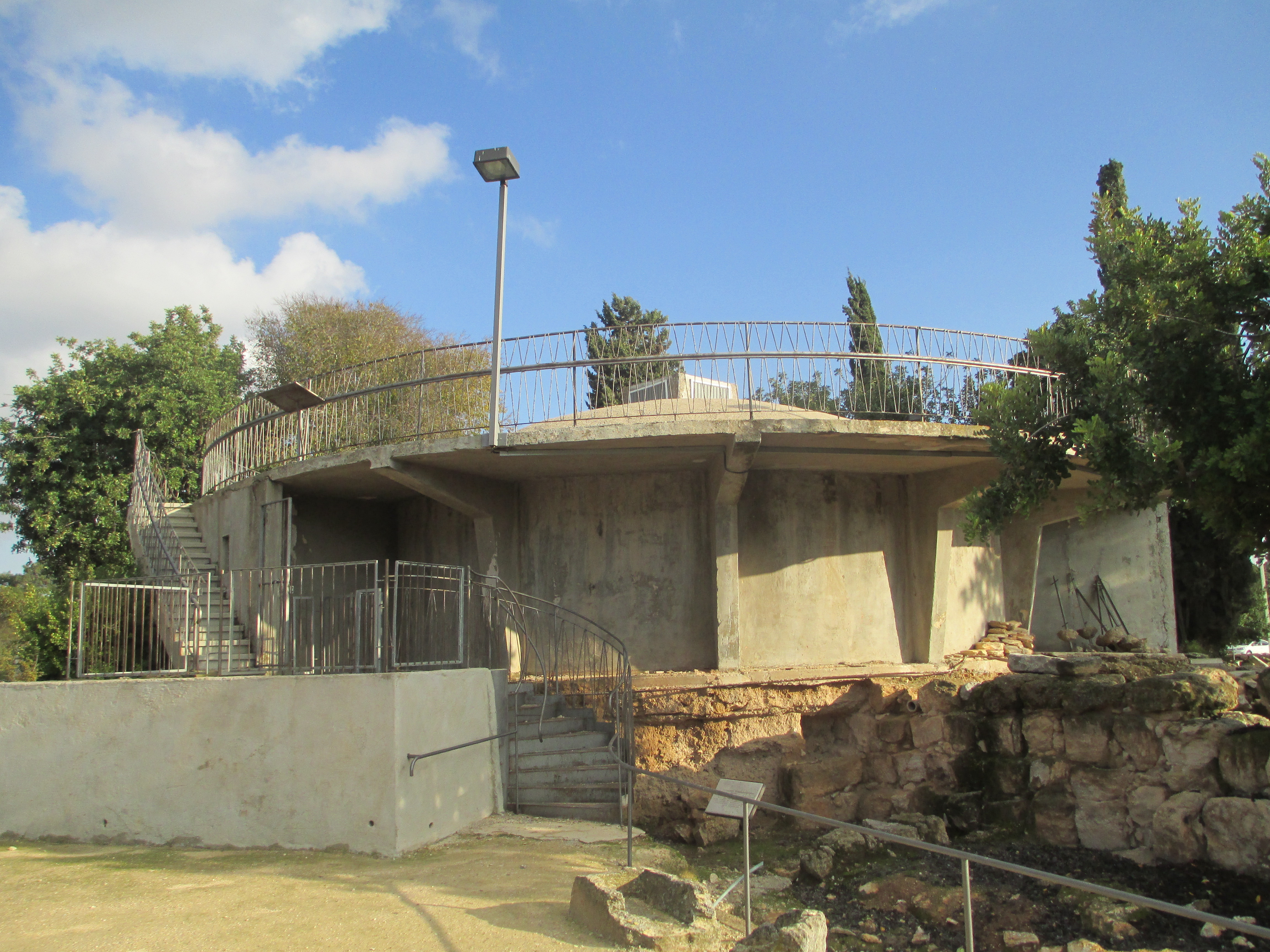 בריכת המים בפארק הארכאולוגי ברמת רחל עליה עמדו הארכאולוגים כשנפתחה עלים אש ממוצב ירדני ממנה נהרגו חמישה